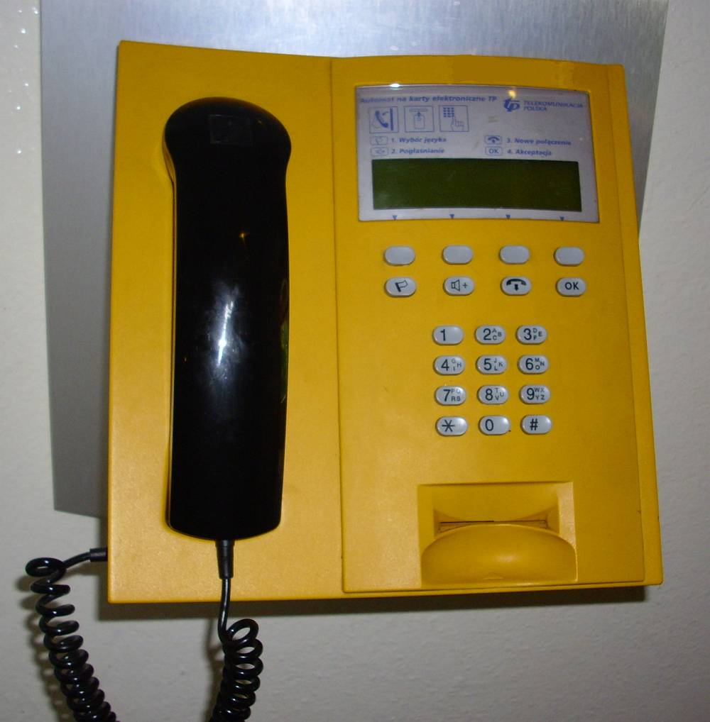 Aparat telefoniczny Ascom eXanto indoor.